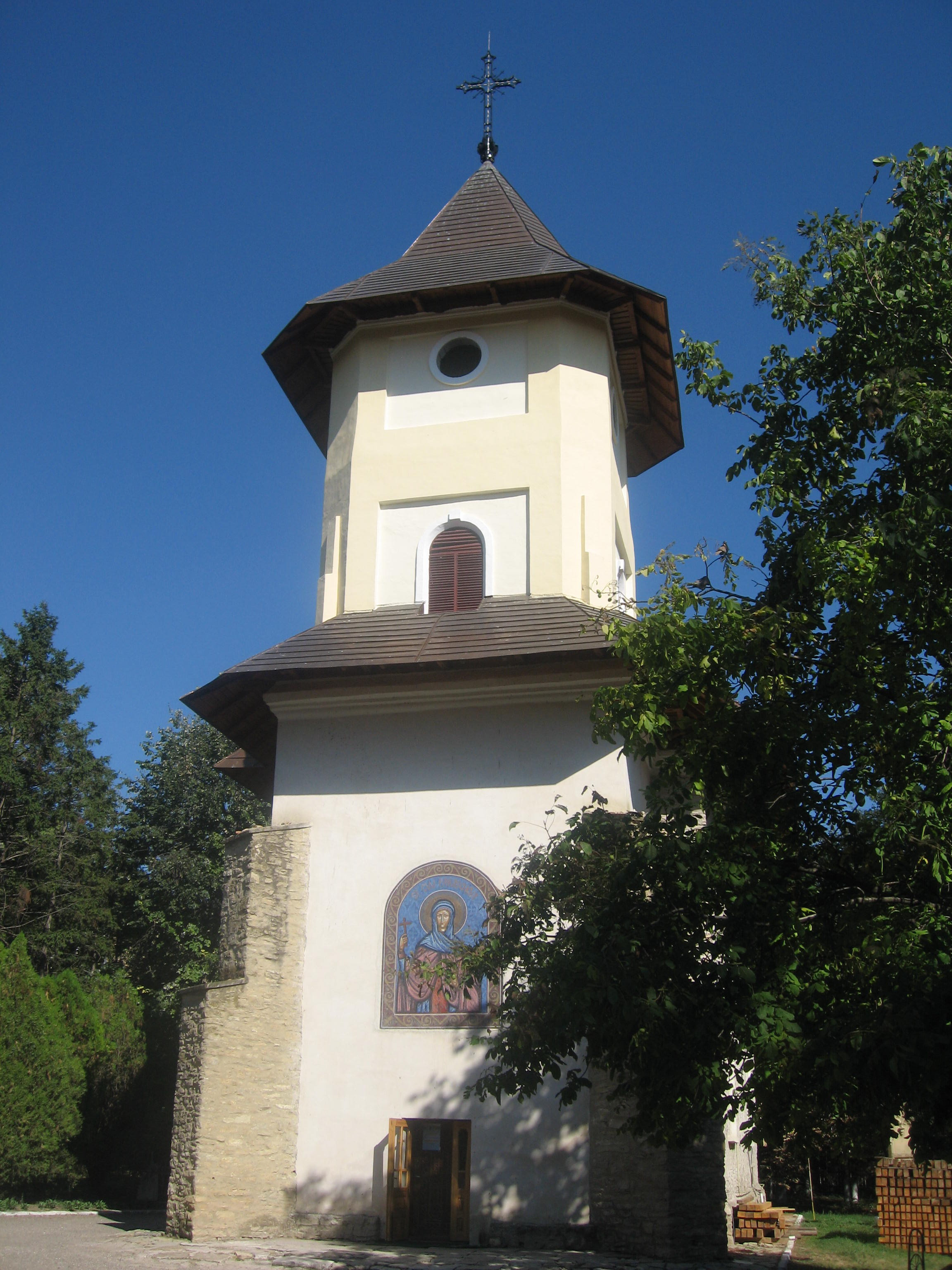 Biserica Sf. Parascheva din Târgu Frumos, România